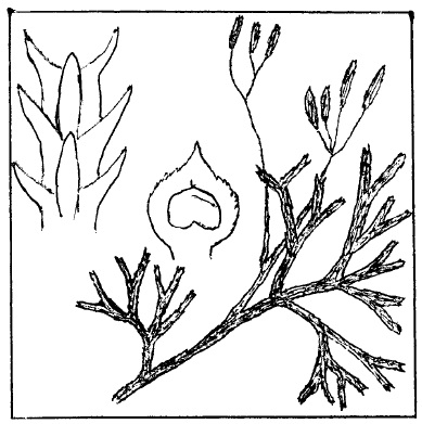 Plavuník Zeillerův